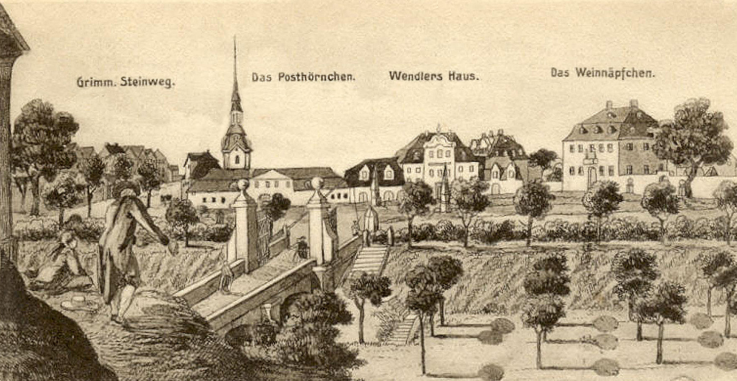 Blick vom Grimmischen Thore nach dem Steinweg und der Johannisgasse 1785; Grimmaischer Steinweg, Posthörnchen, Wendlers Haus, Weinnäpfchen